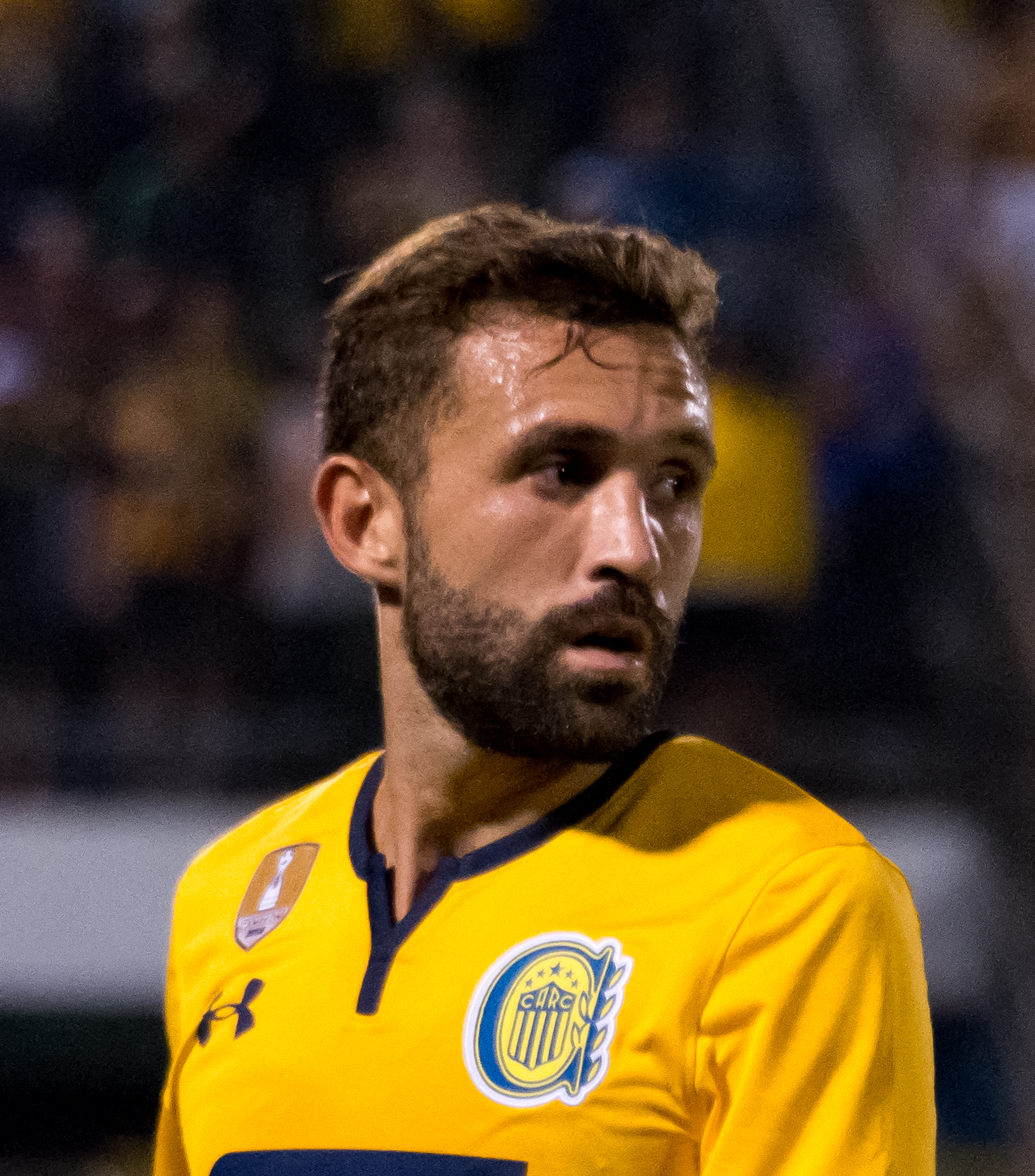 Agustín Allione, Universidad Católica v Rosario Central, Estadio San Carlos de Apoquindo, Las Condes, Santiago, Chile.